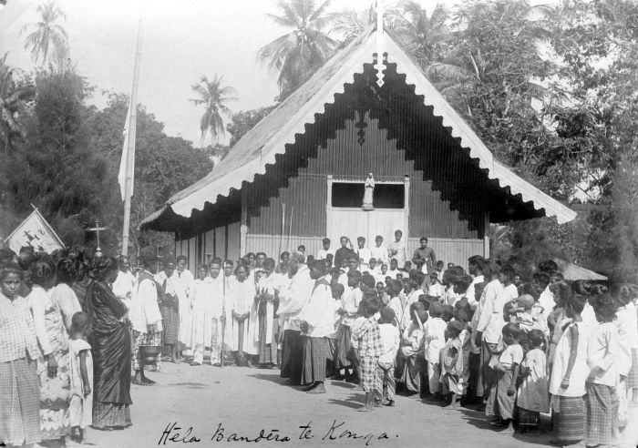 Repronegatief. Het hijsen van de vlag van de Rozenkrans voor de Rooms-Katholieke kerk te Konga tijdens de opening van de Novene